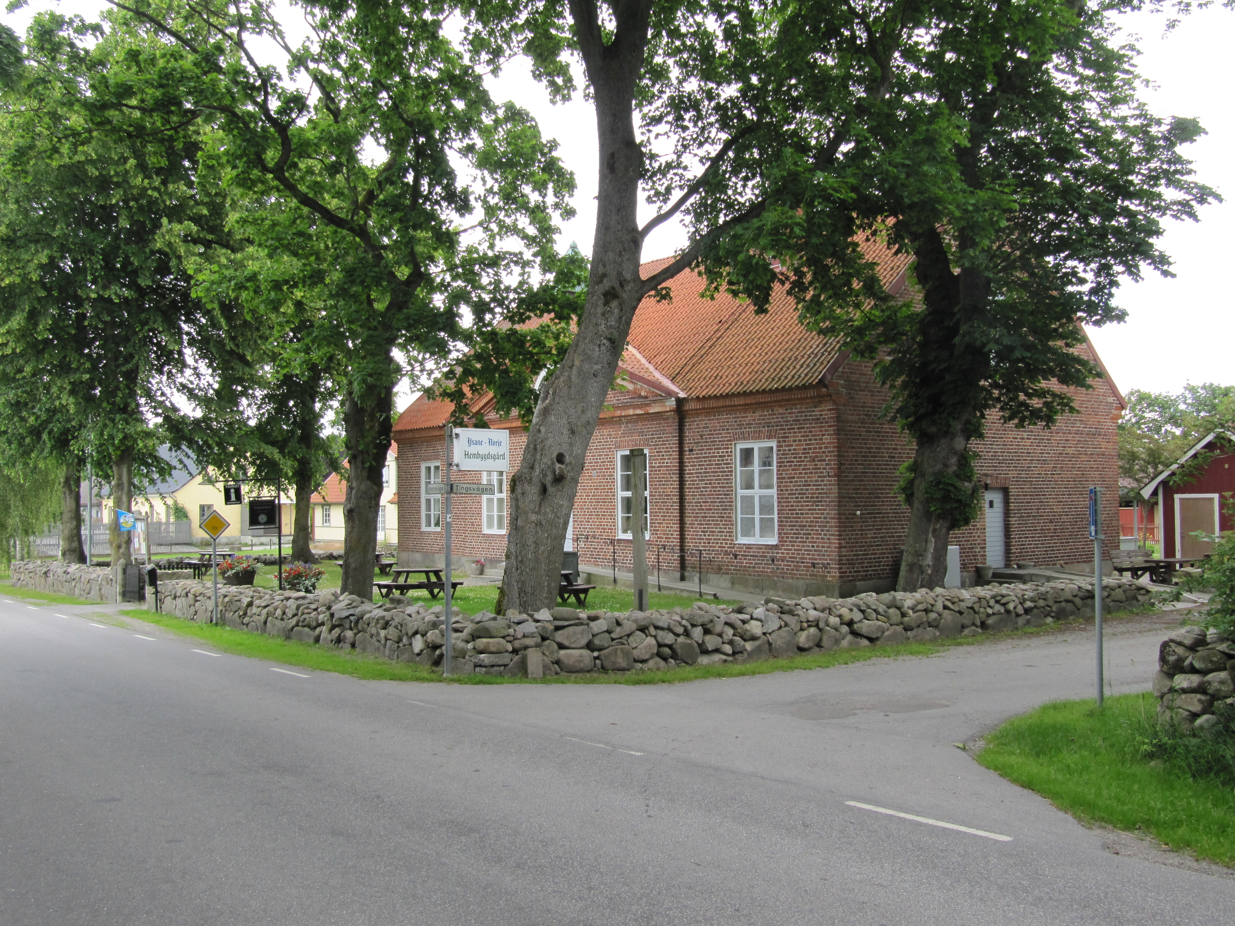 Ysane-Norje hembygdsgård